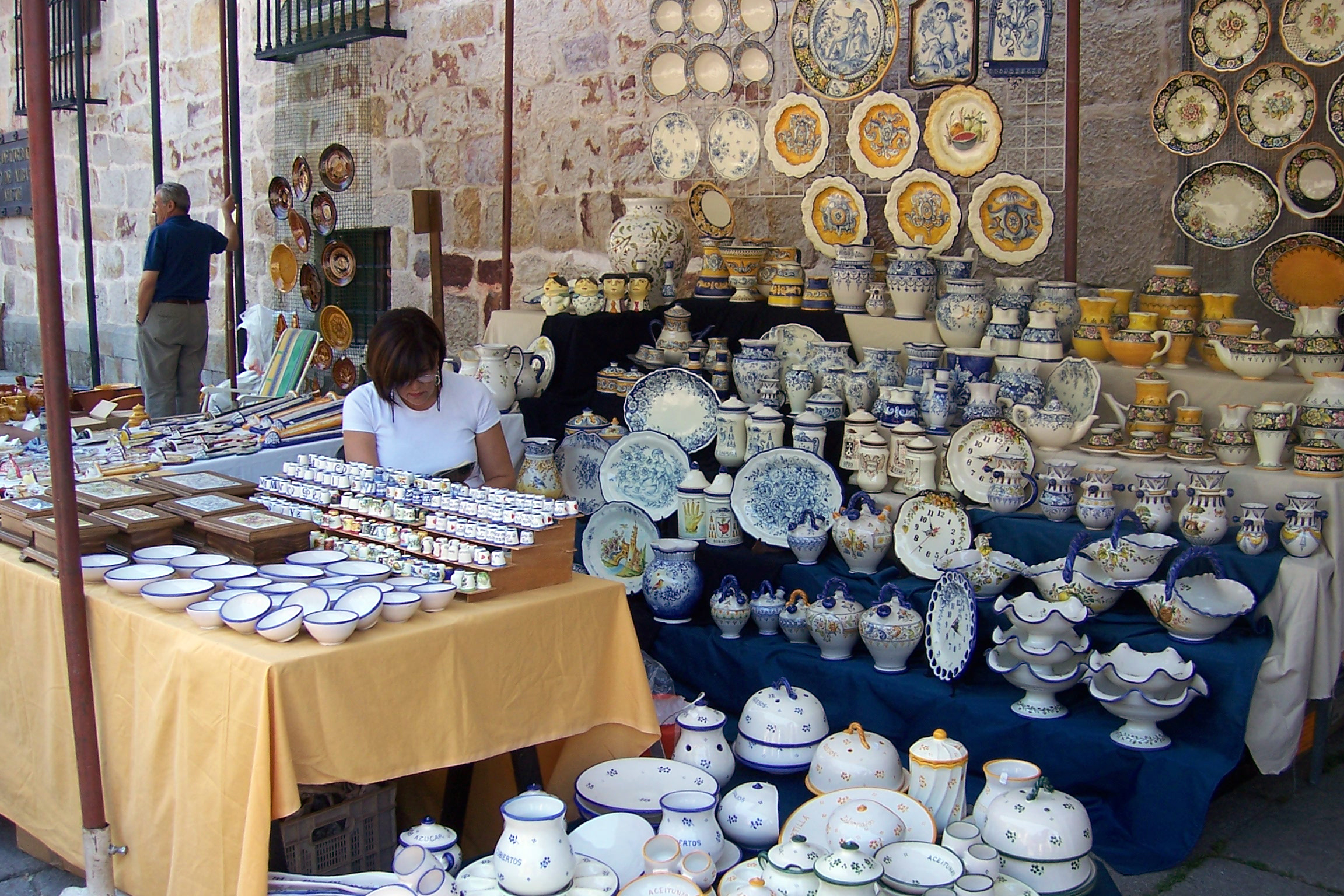 Feria de la Cerámica en la plaza de Viriato de Zamora (España). Año 2008.